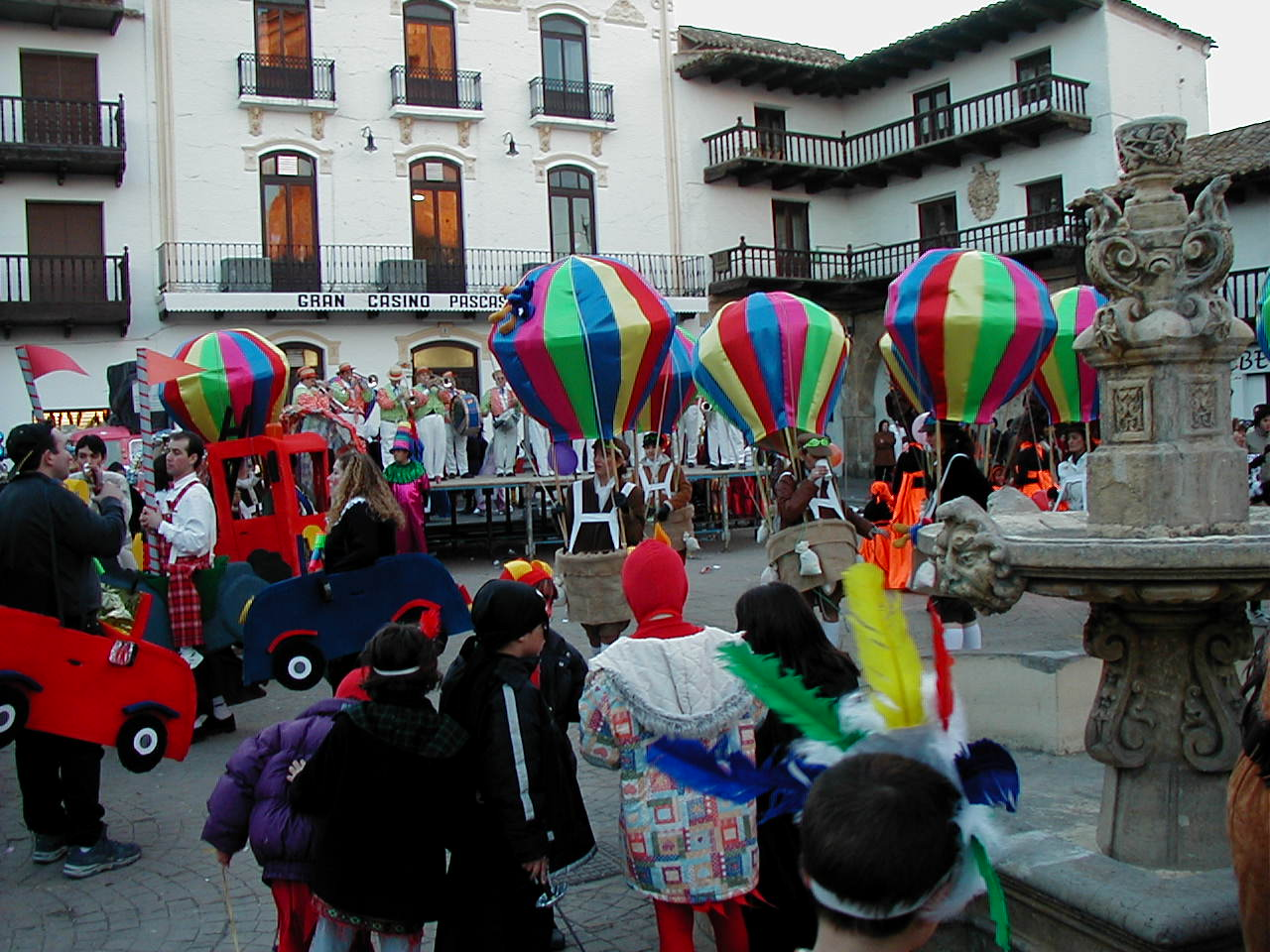 Desfile de Carnaval de Tarazona de la Mancha. Peñas de carnaval